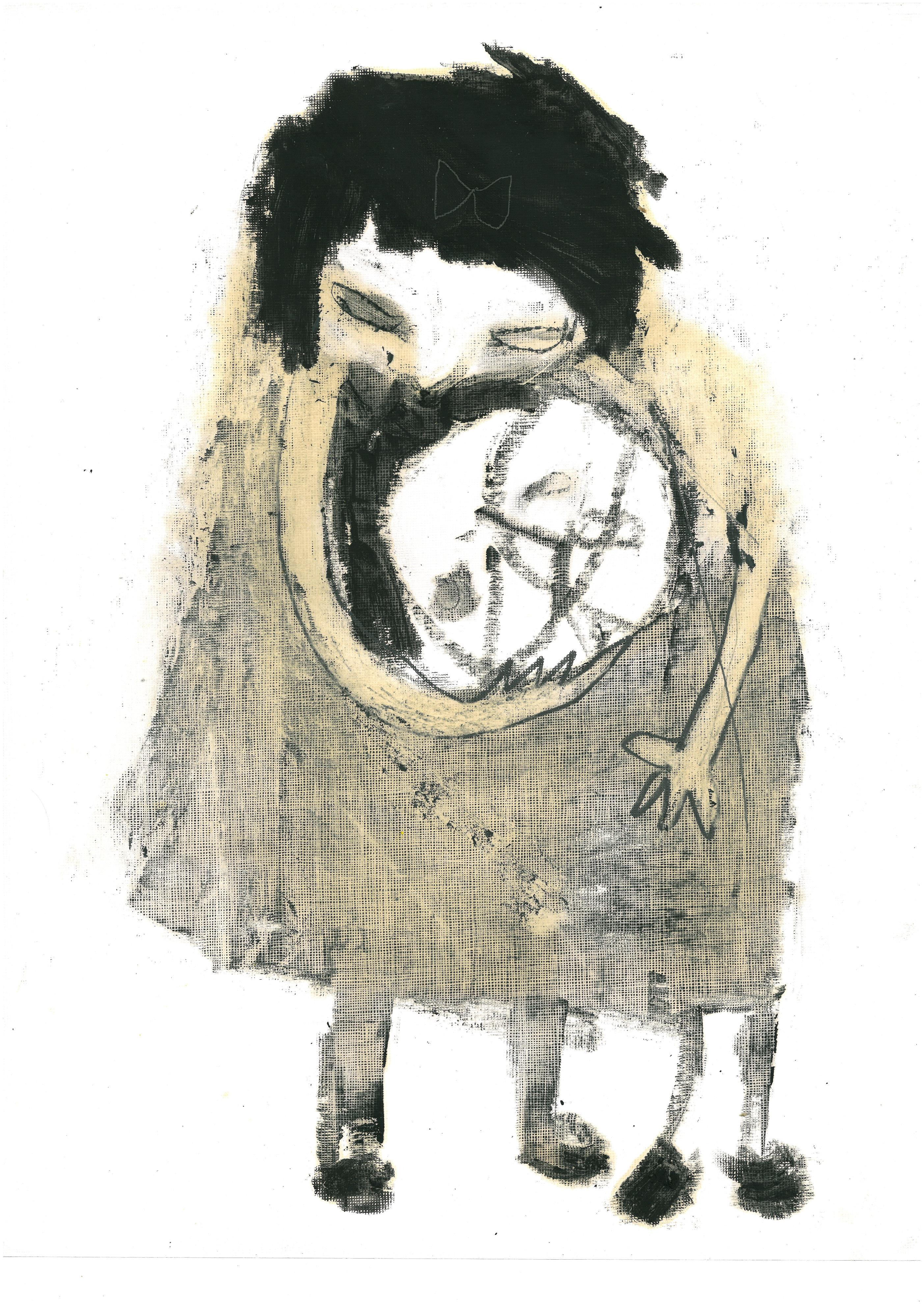 טכניקה מעורבת על נייר, 21/15 ס"מ, 2012